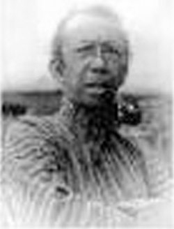 矢崎千代二